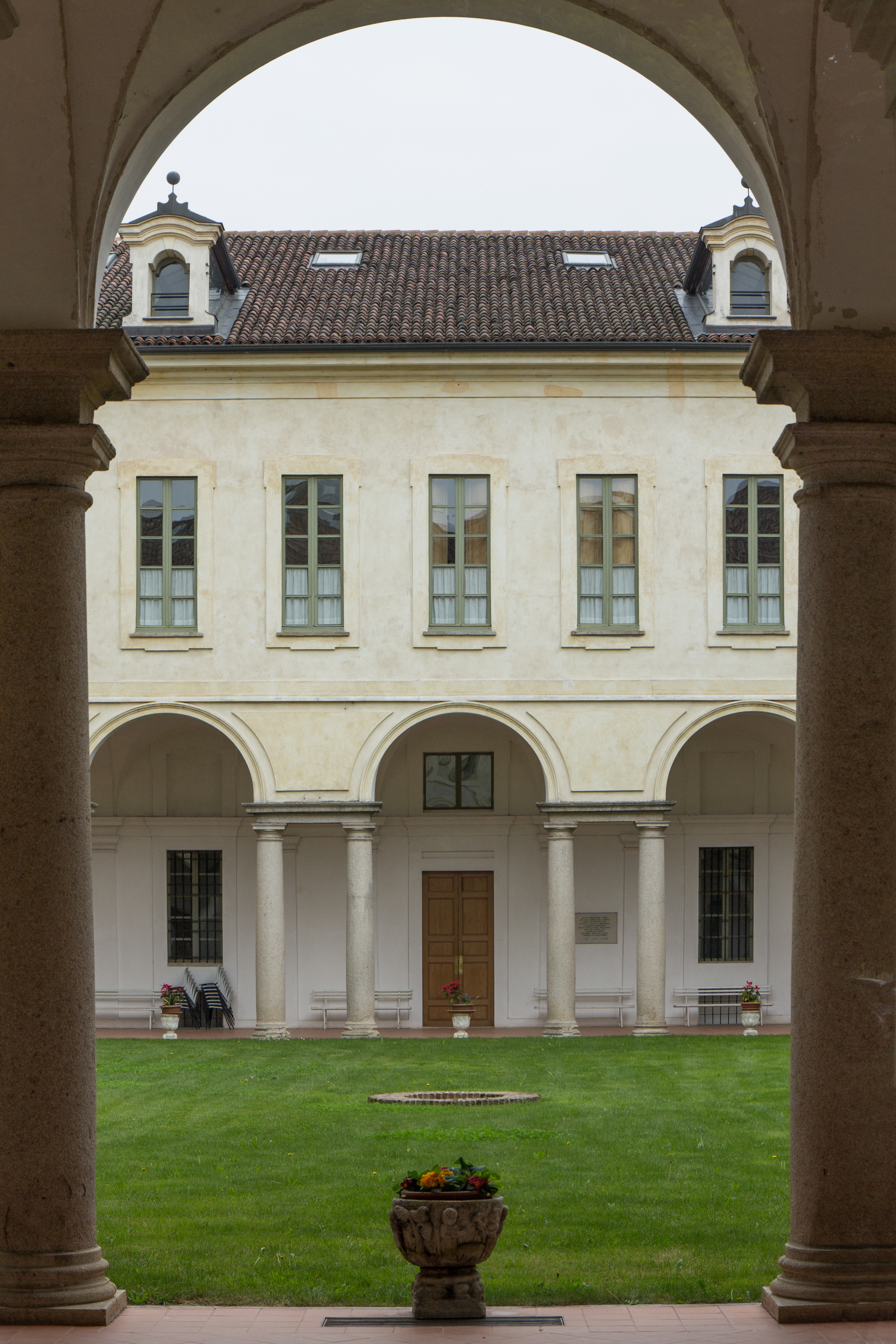 Carmagnola Abbazia di Santa Maria di Casanova ingresso